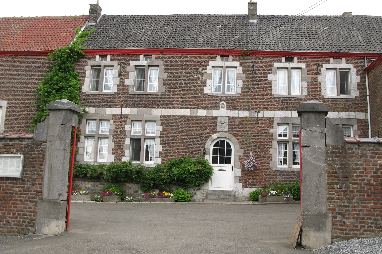 Déi fréier Seigneurerie vu Feneur am Juni 2008.